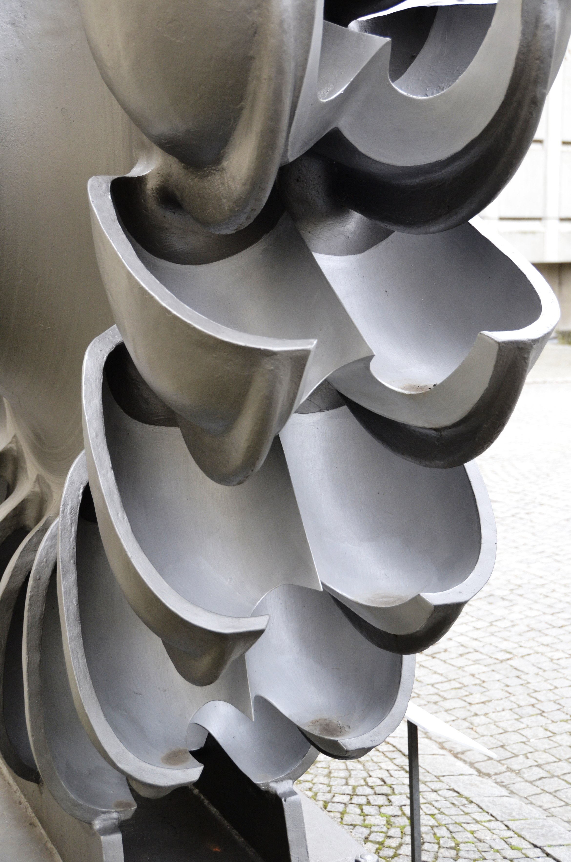 Eine Pelton-Turbine im Museumshof des Deutschen Museums. Diese Turbine war im Kraftwerk Vermunt von 2931 bis 1952 in Betrieb.